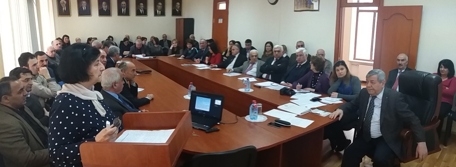 Institutun Elmi seminarında